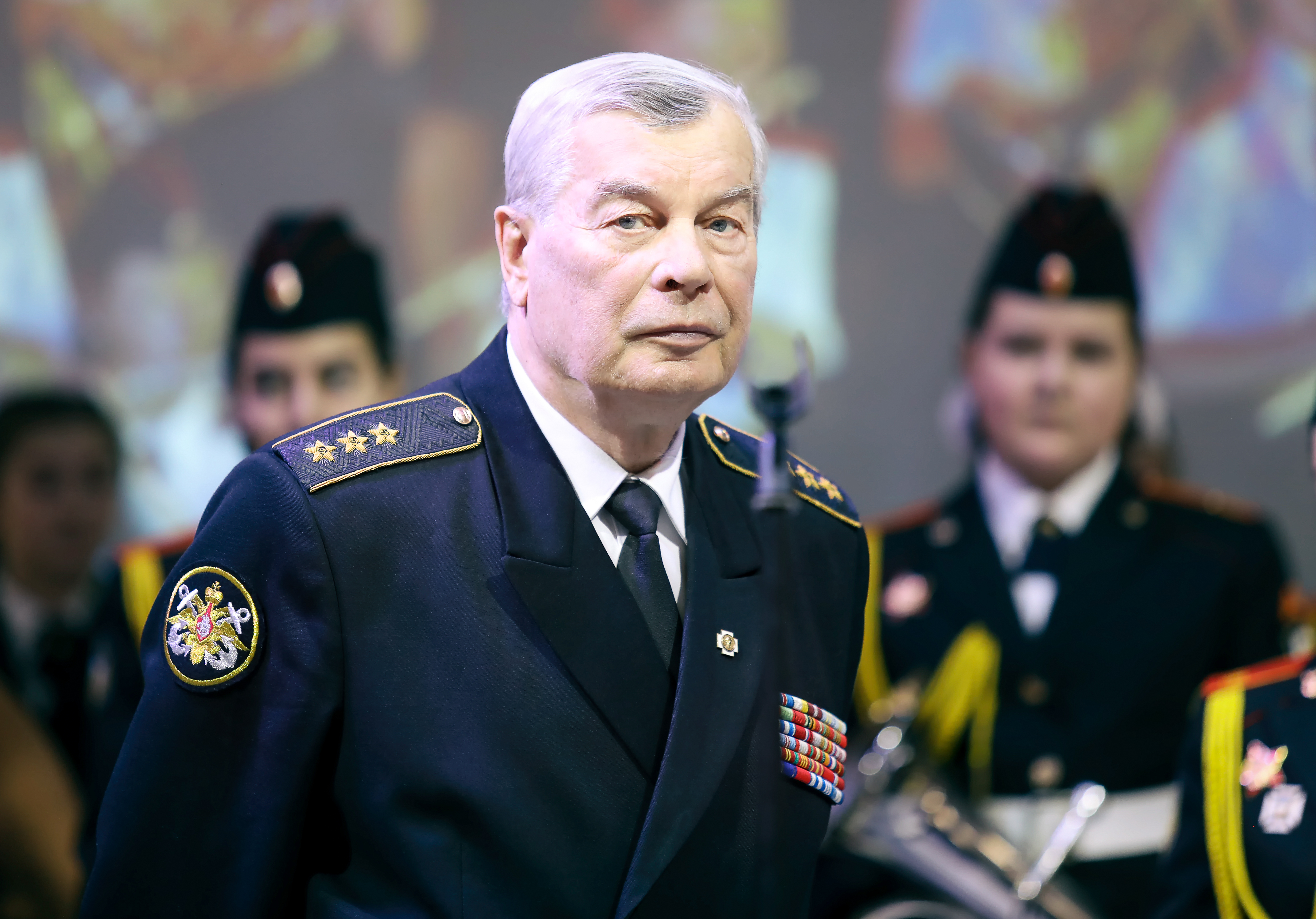 Адмирал Валентин Егорович Селиванов в Российской государственной детской библиотеке на концерте детских коллективов из кадетских школ и училищ г. Москвы.